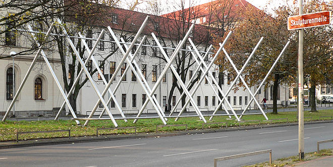 Skulptur Avenue K 1968 von Kenneth Snelson auf der Skulpturenmeile in Hannover /Germany. Foto aufgenommen von Benutzer Benutzer:Axel Hindemith, Dezember 2005